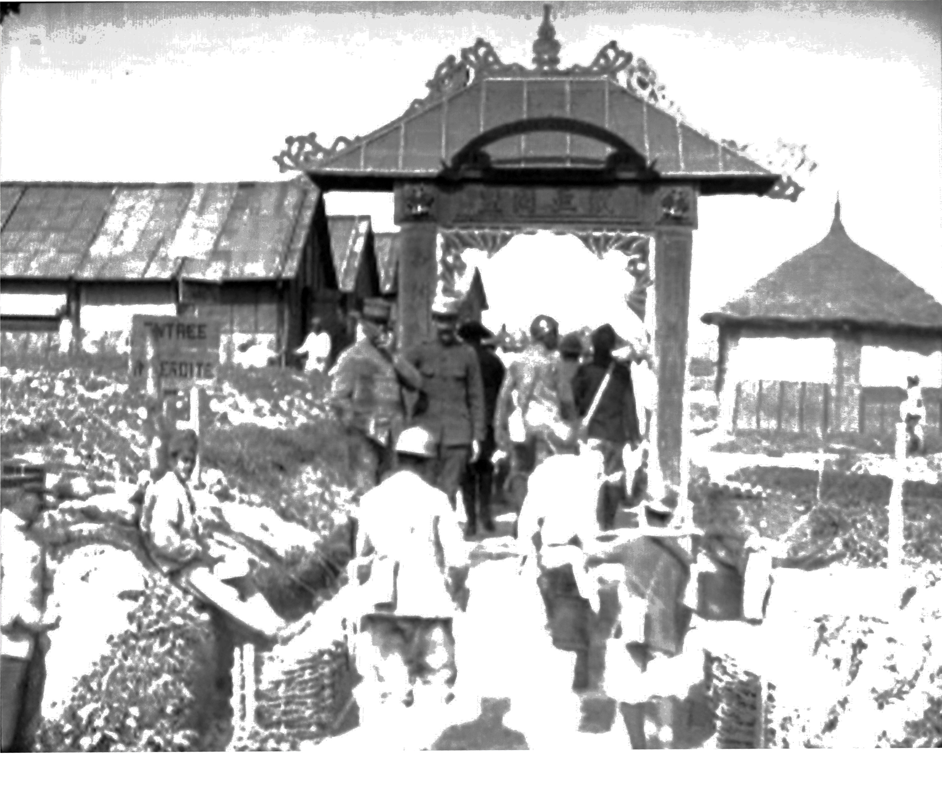 Lors de l'exposition Indochine des territoires et des hommes 1856 1956.